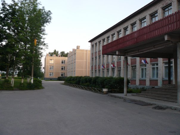 Вид на Начальную и Среднюю школы г.Каменногорска